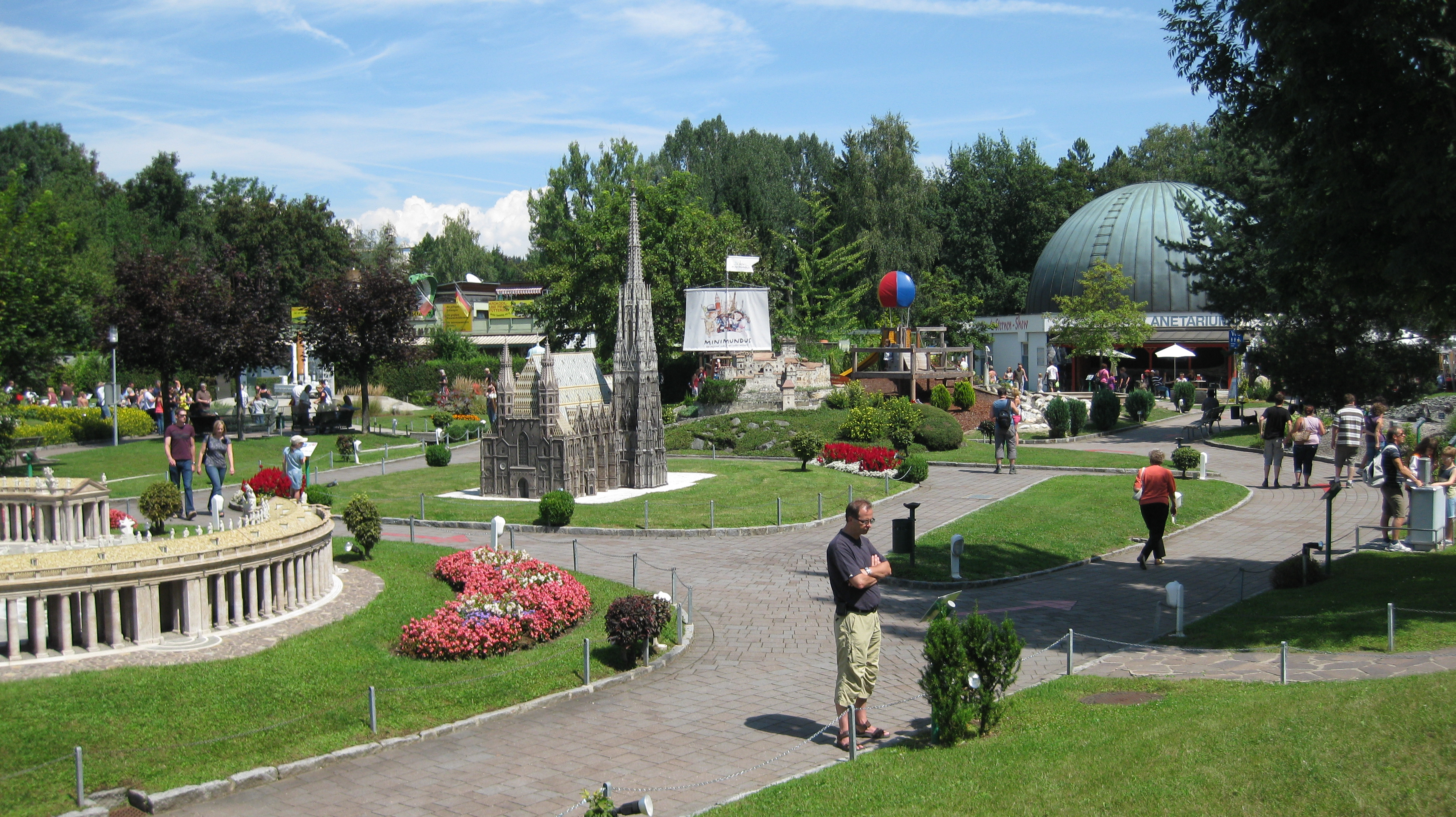 Freizeitpark Minimundus im Sommer 2011.